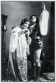 Франческа — Н. Салина, Паоло — А. Боначич. Большой театр. 1906